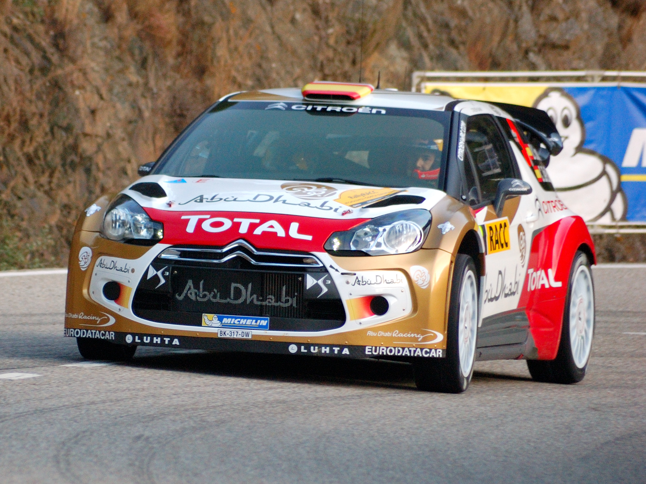 Sordo/Del Barrio SS4 Riudecanyes - Rally Catalunya 2013